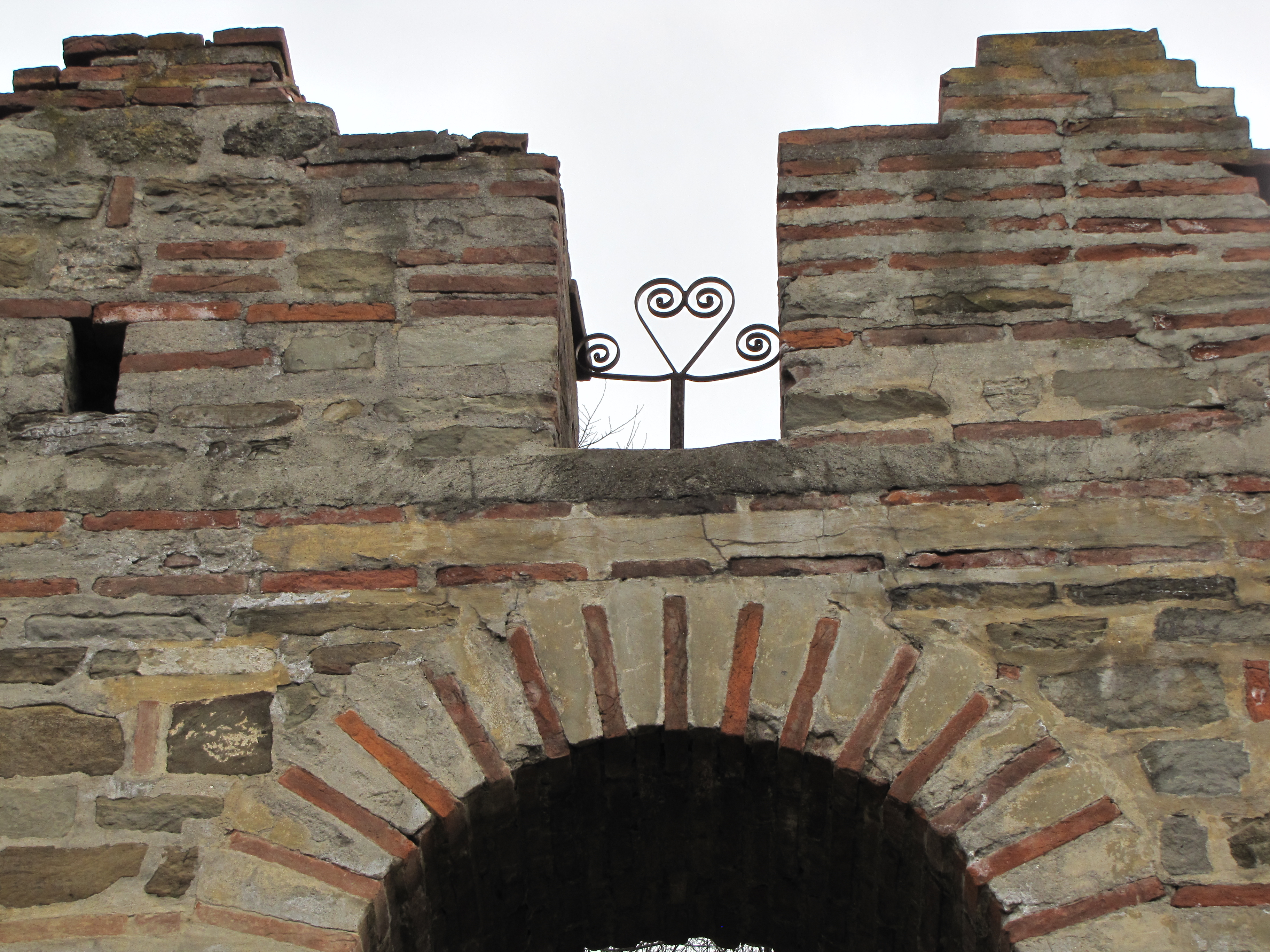 Манастири Свете Богородице и Светог Николе су прве задужбине Стефана Немање, у време када је у данашњој Куршумлији, тадашњој Топлици био и његов двор, Извесно време Куршумлија се звала Беле цркве, по белим, сјајним, оловним крововима ових светиња, У манастиру Свете Богородице, се замонашила Немањина жена Ана, као монахиња Анастасија, У овом манастиру боравиле су султанија-царица Мара и Мирослава Балшић, као монахиња Агрипина, Од Манастира Свете Богородице данас постоје само остаци зидова.